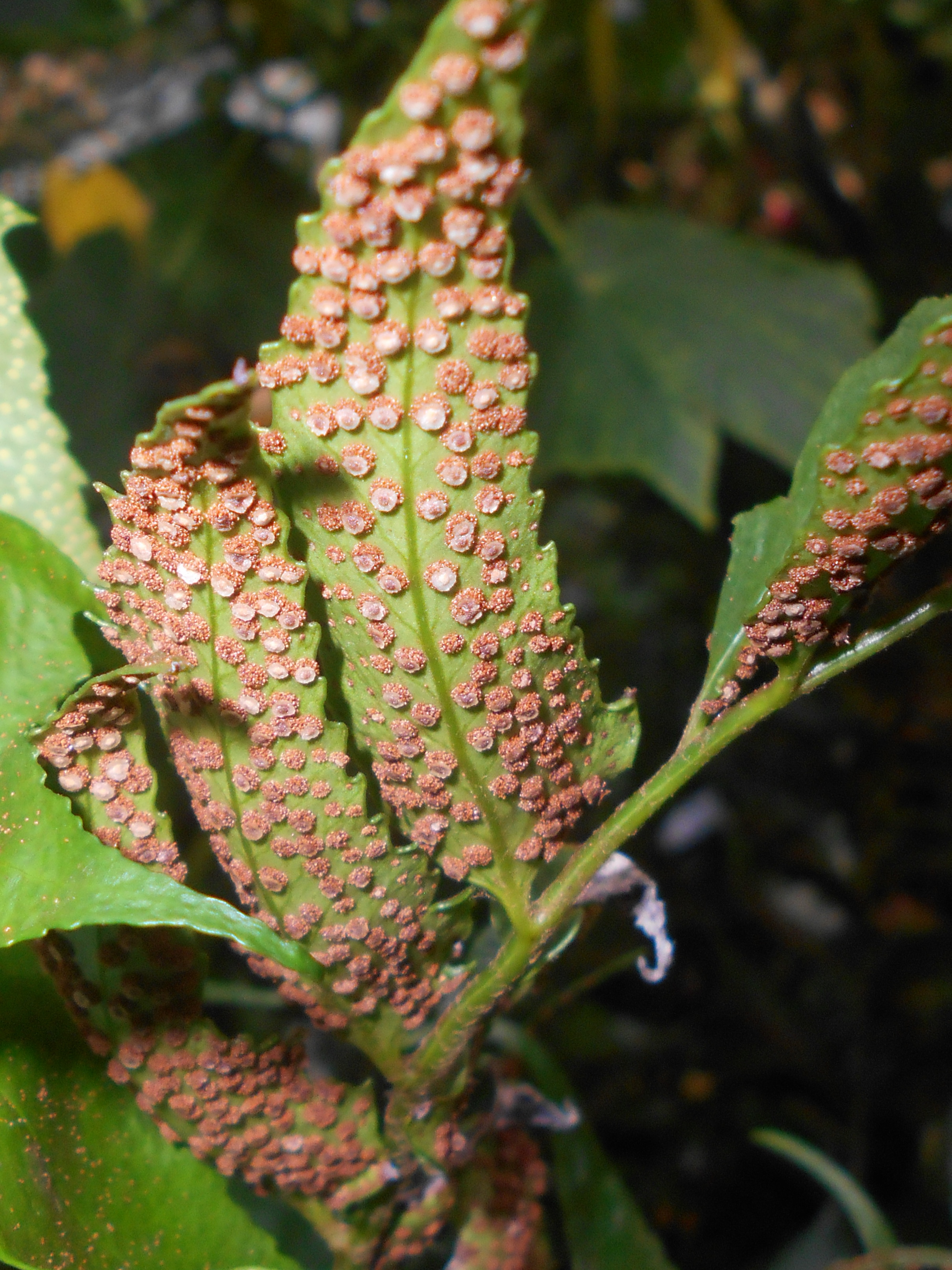 Paprotnik sierpowaty (Cyrtomium falcatum), Ogród Botaniczny w Zabrzu.